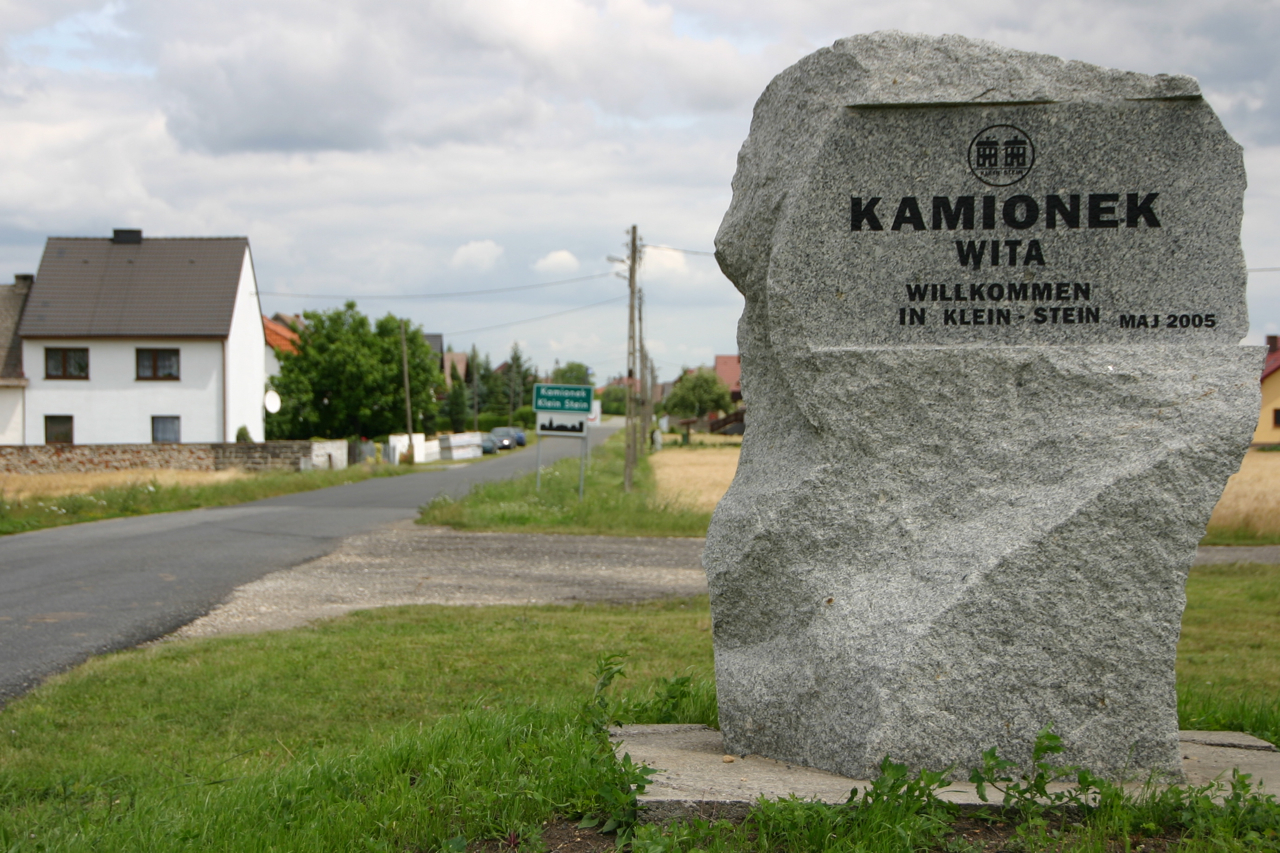 Kamionek (dodatkowa nazwa w j. niem. Klein Stein) – wieś w Polsce położona w województwie opolskim, w powiecie krapkowickim, w gminie Gogolin.